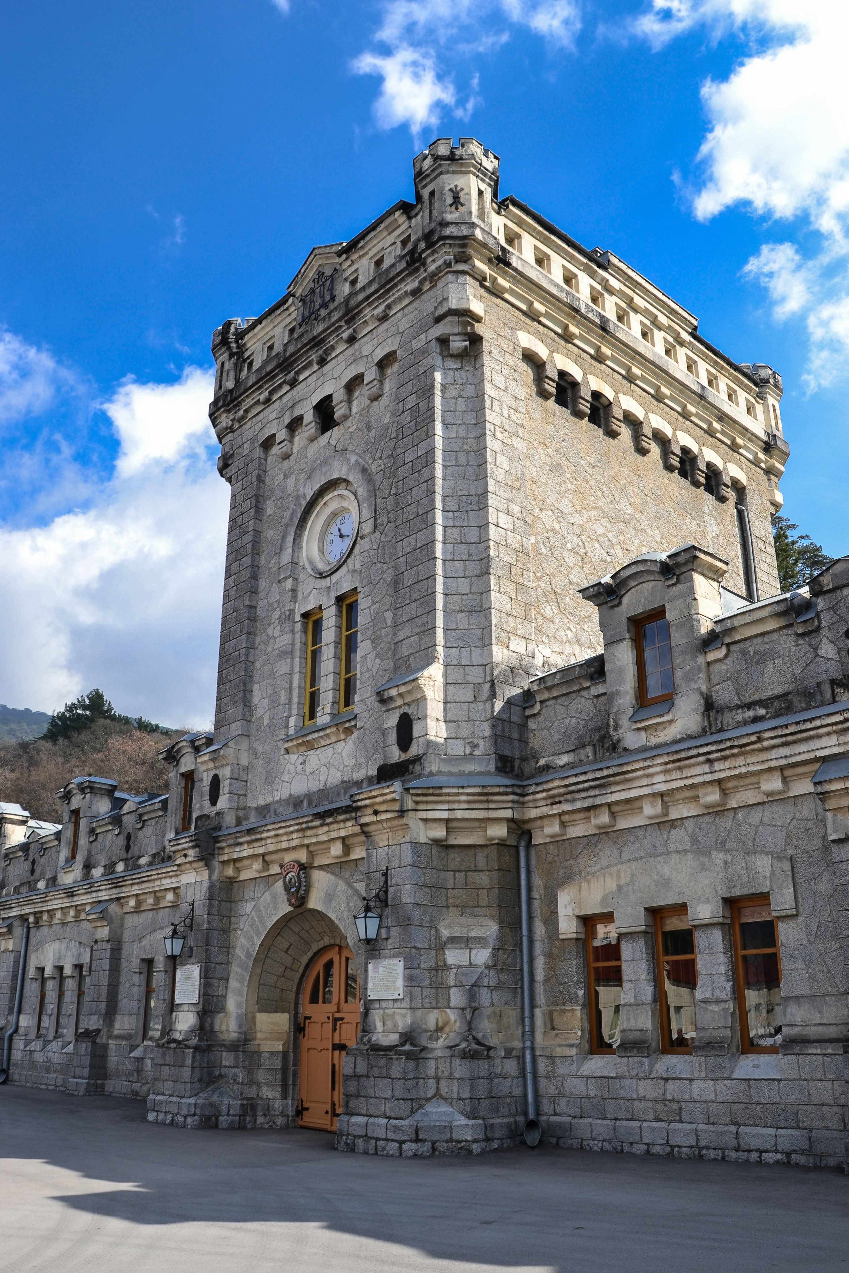 Будівля головного корпусу комплексу винних підвалів «Масандра», Масандра, смт Масандра, вул. Винороба Єгорова, 9, літер «Б»